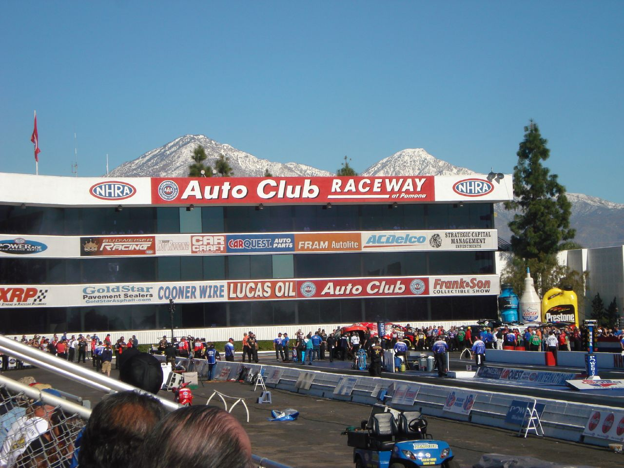 Pomona, CA